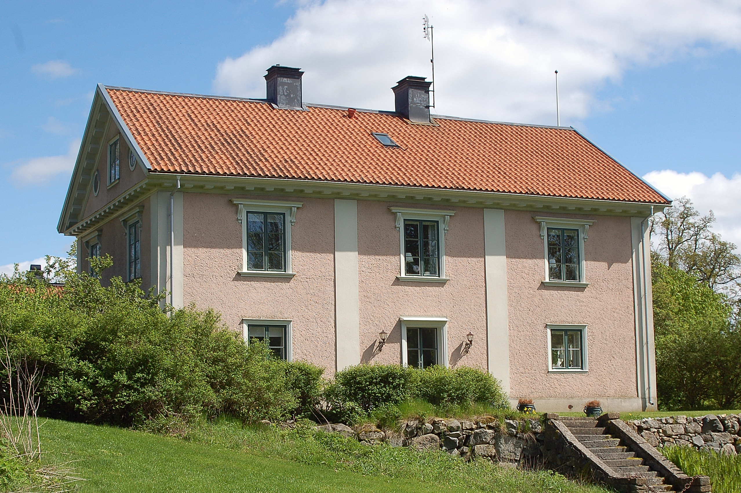 Riseberga gods från väster.